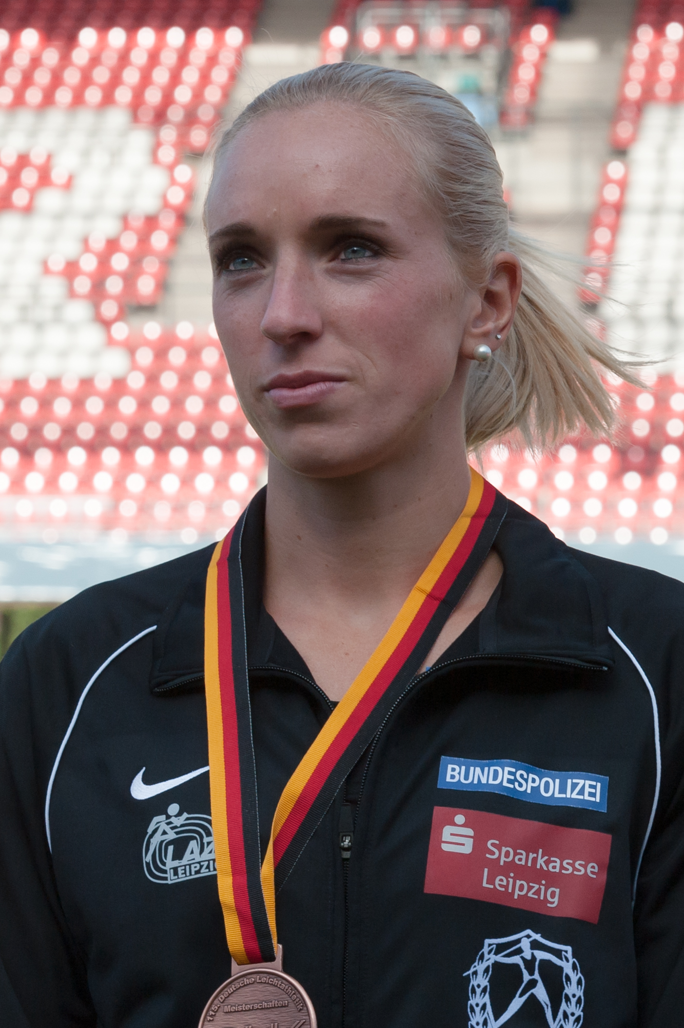 Deutsche Leichtathletik-Meisterschaften 2015: Frauen 200m - Cindy Roleder, SC DHFK Leipzig